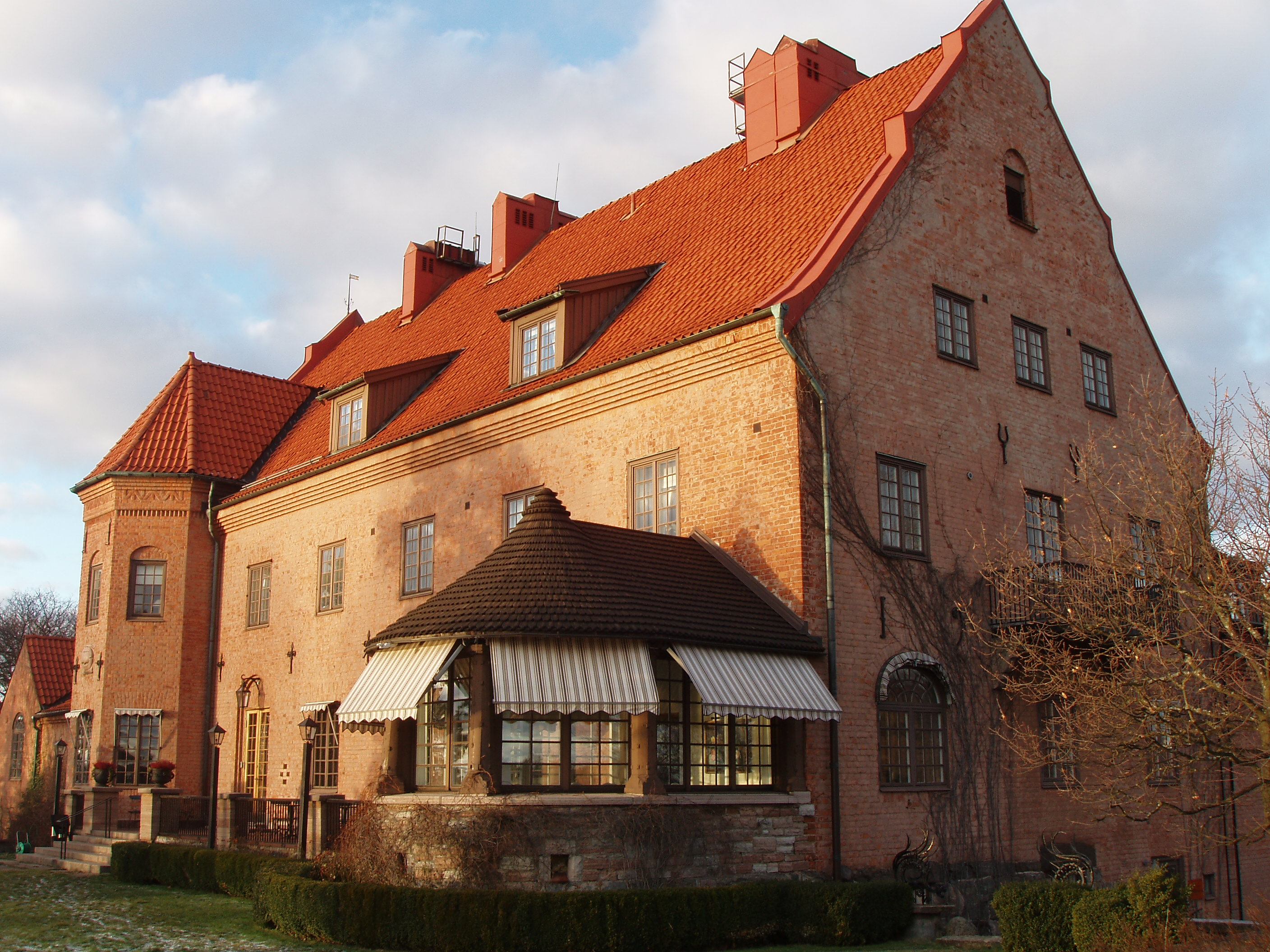 Villa Högberga (Högberga gård), Lidingö. Trädgårdssidan mot Lilla Värtan.